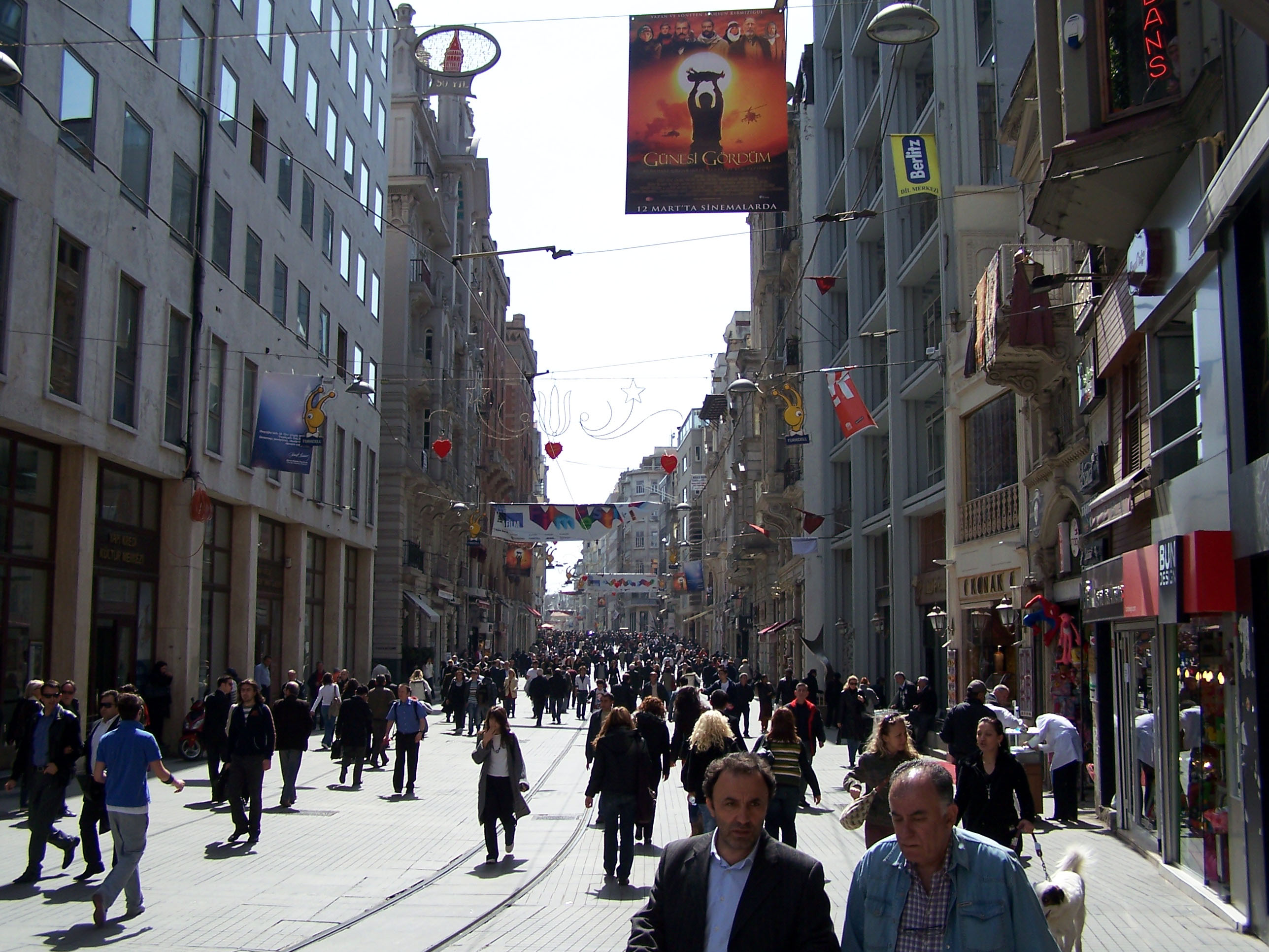 İstiklal Caddesi in Taksim.